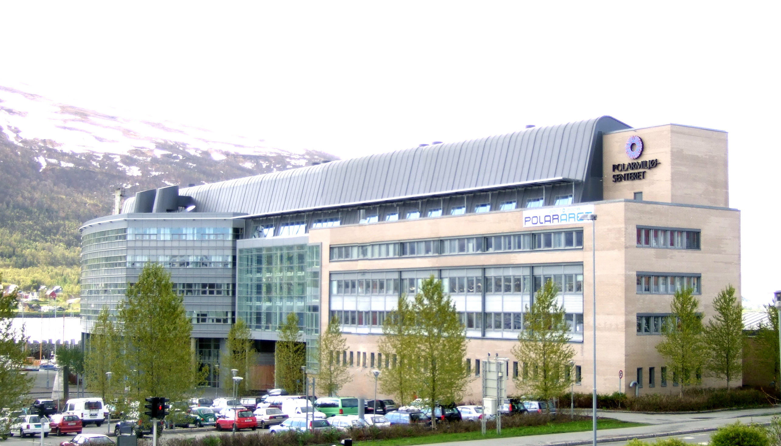 Polarmiljøsenteret, nå Framsenteret, in Tromsø